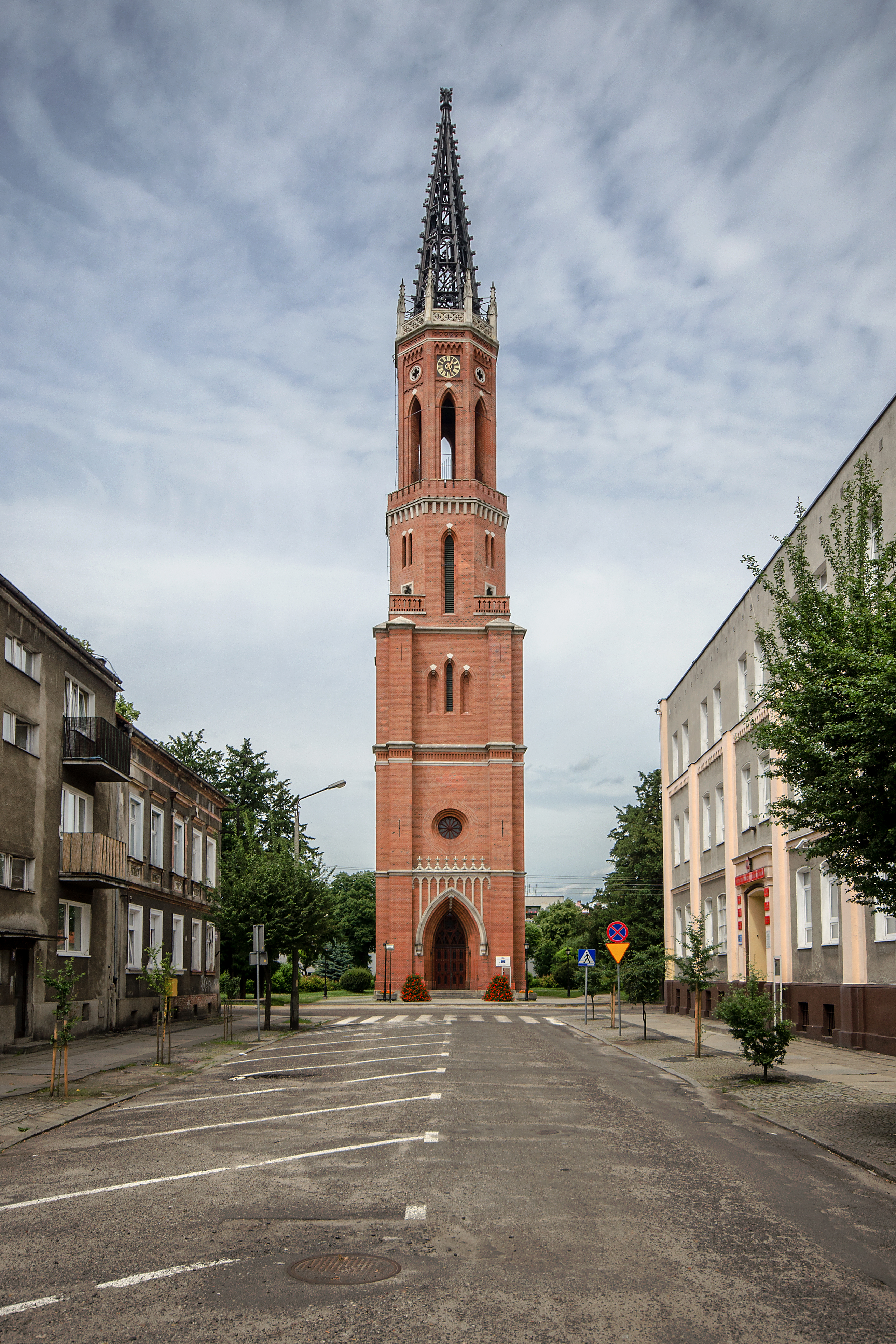 Żagań, wieża kościoła ewangelickiego, 1843-1846